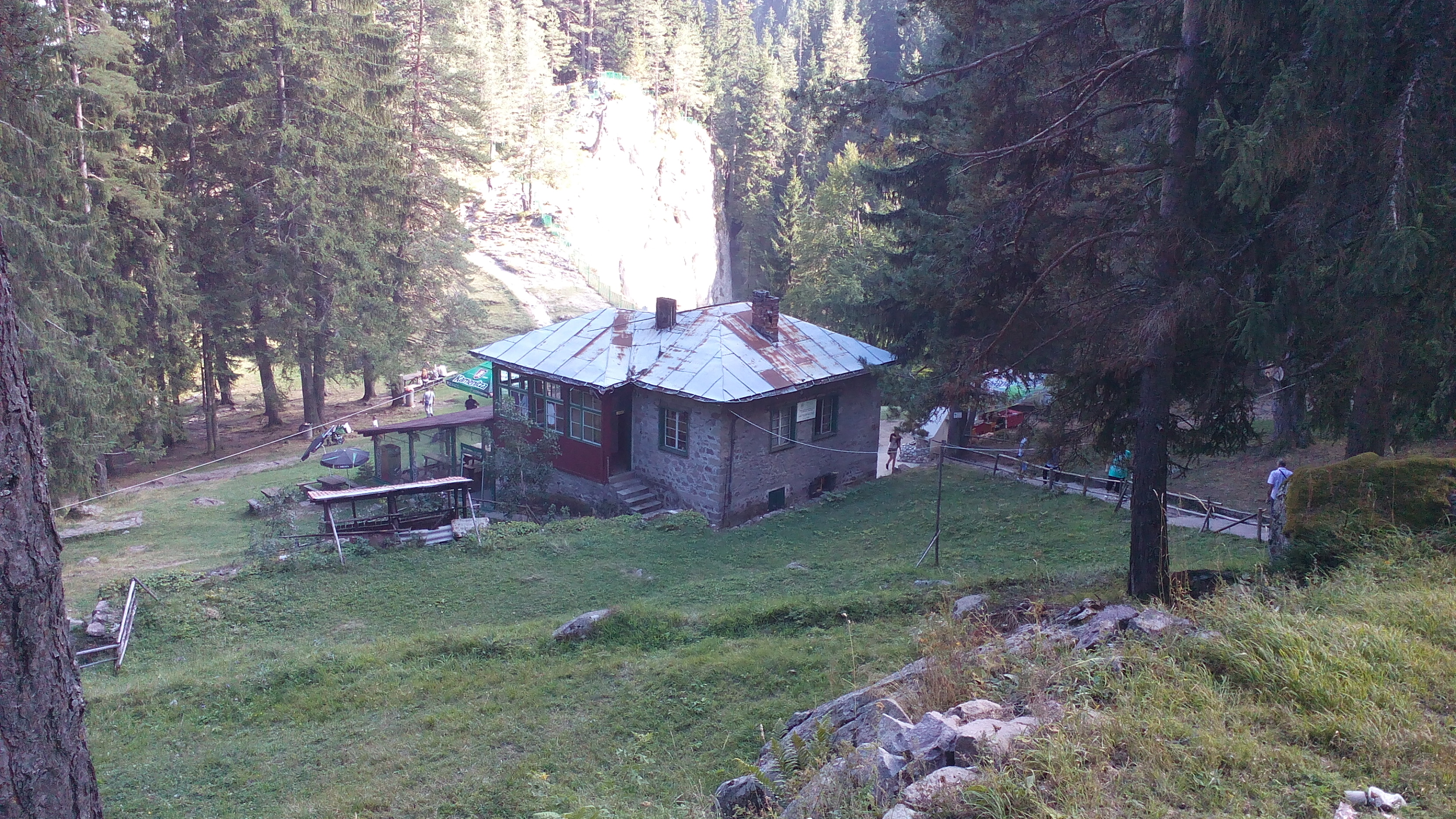 Hut "Chudni mostove" in the Rhodopes